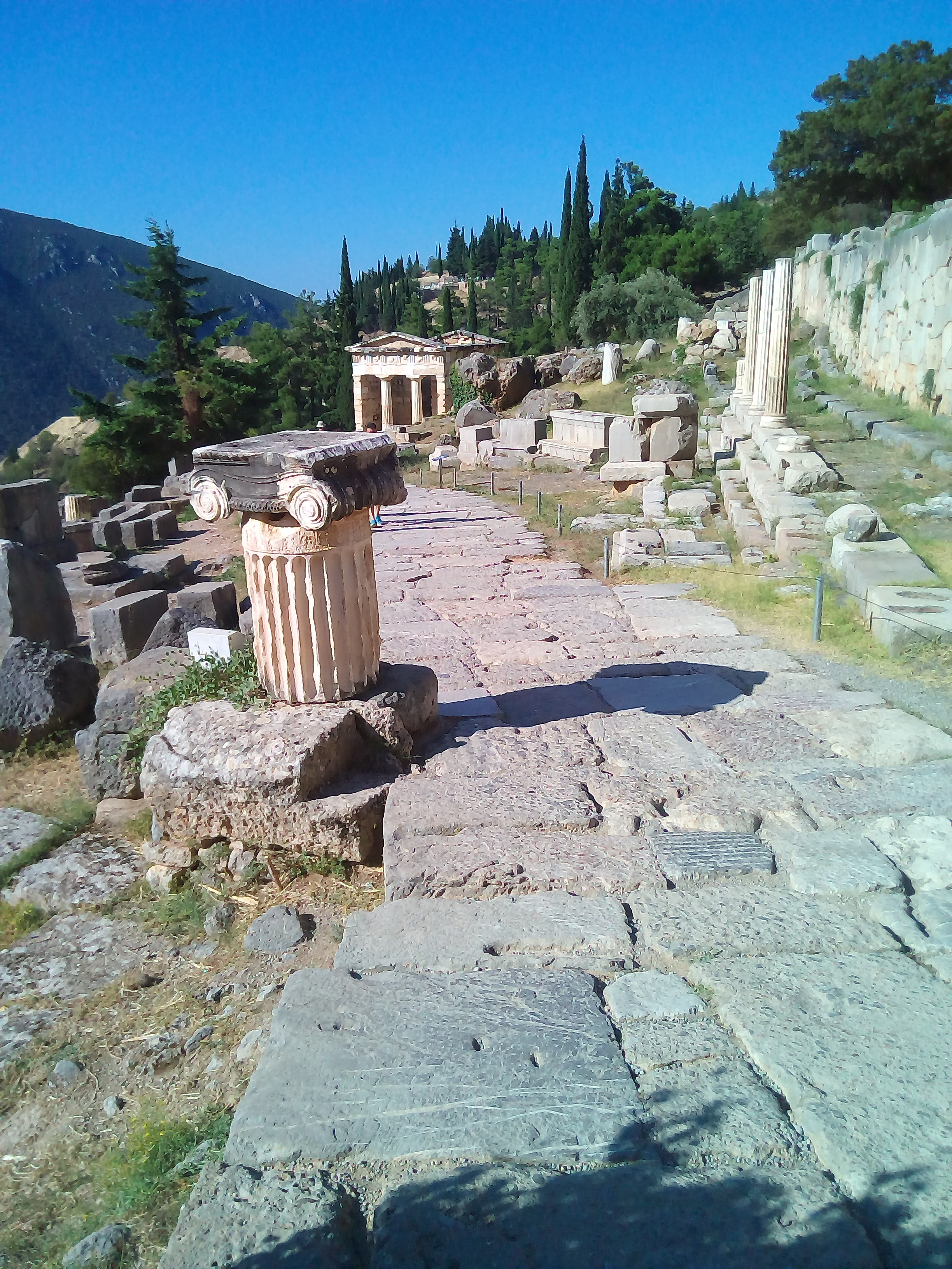 Holy street of Delphi«Ιερά Οδός των Δελφών»